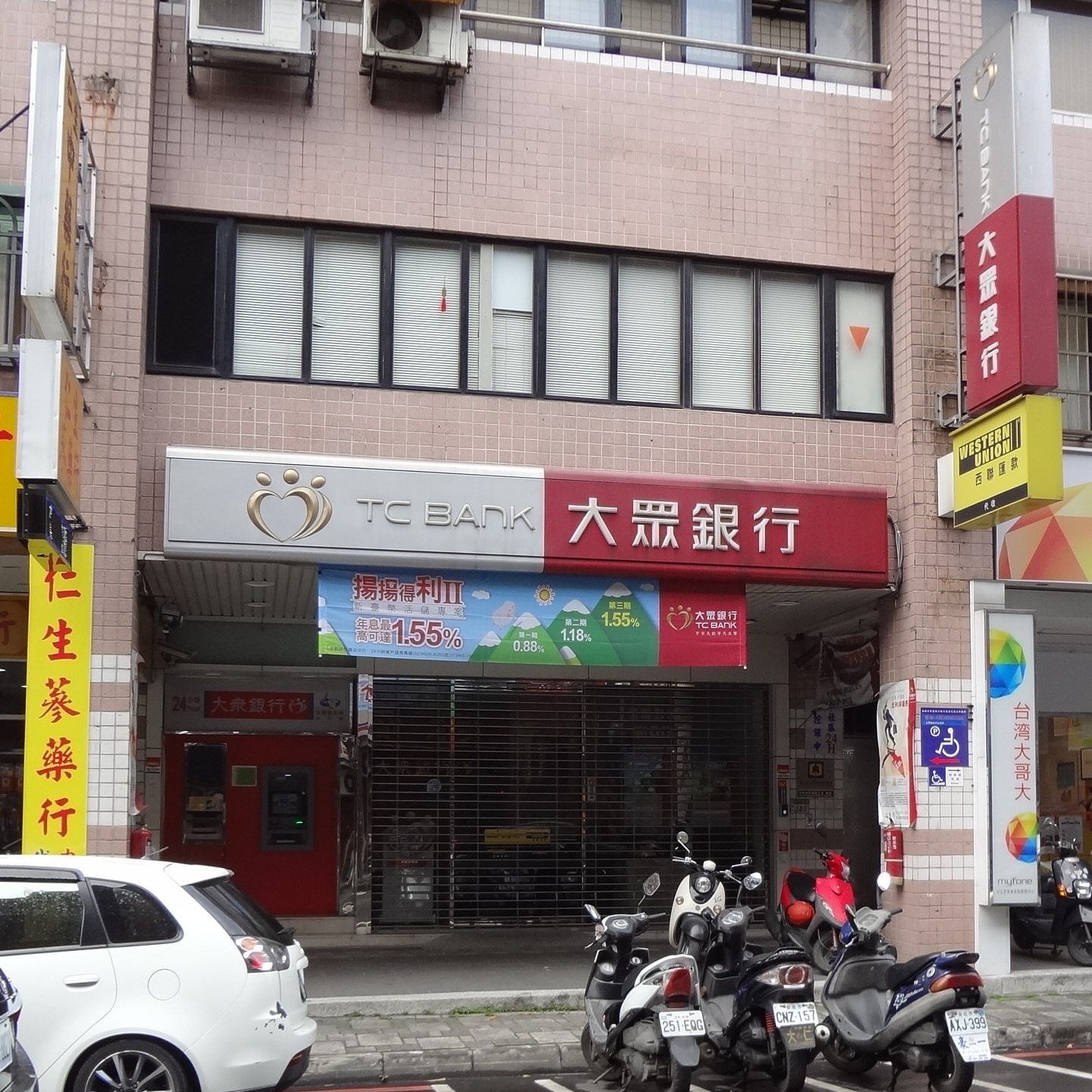 大眾商業銀行汐止簡易型分行，位於臺灣新北市汐止區忠孝東路285號1樓。